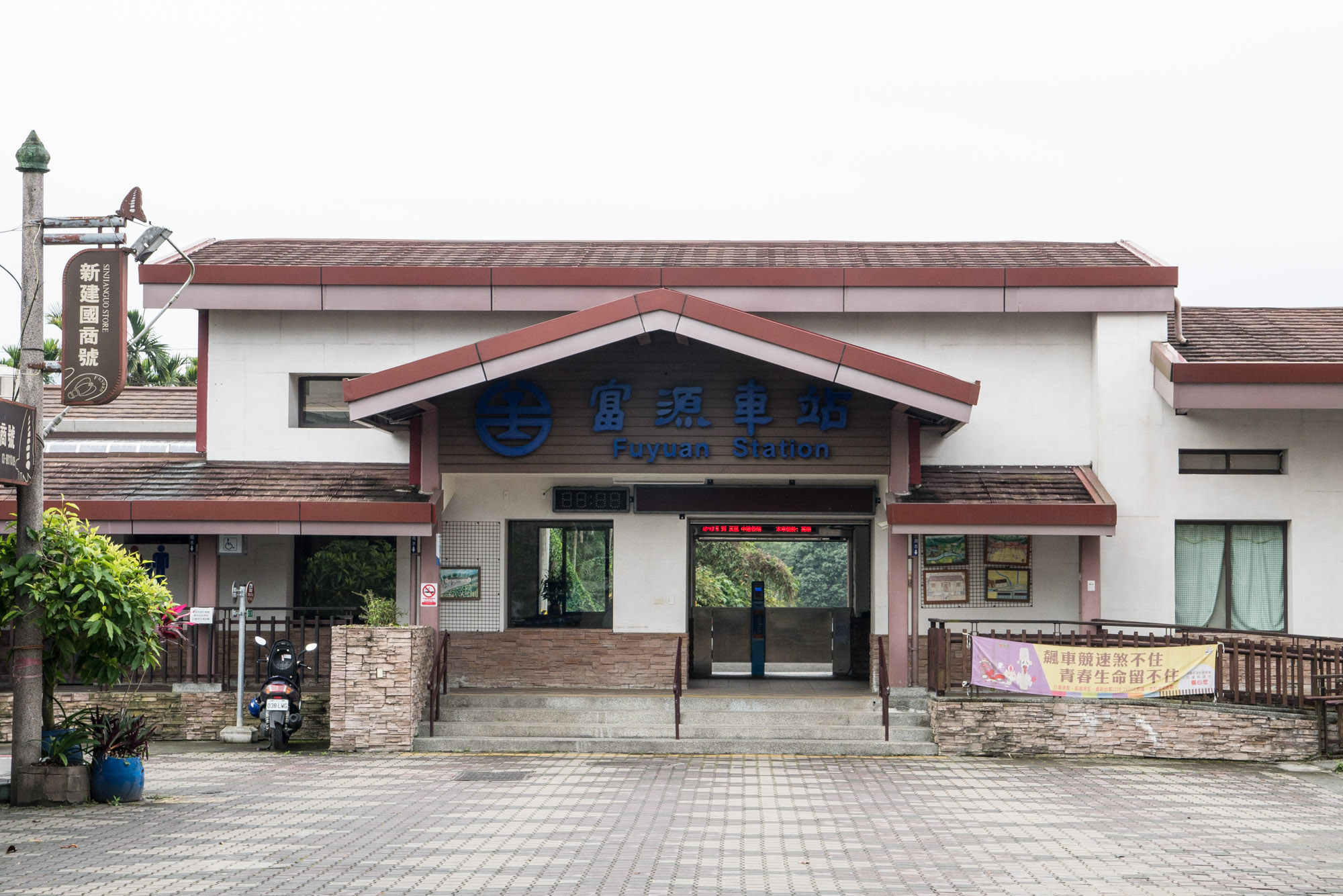 富源車站